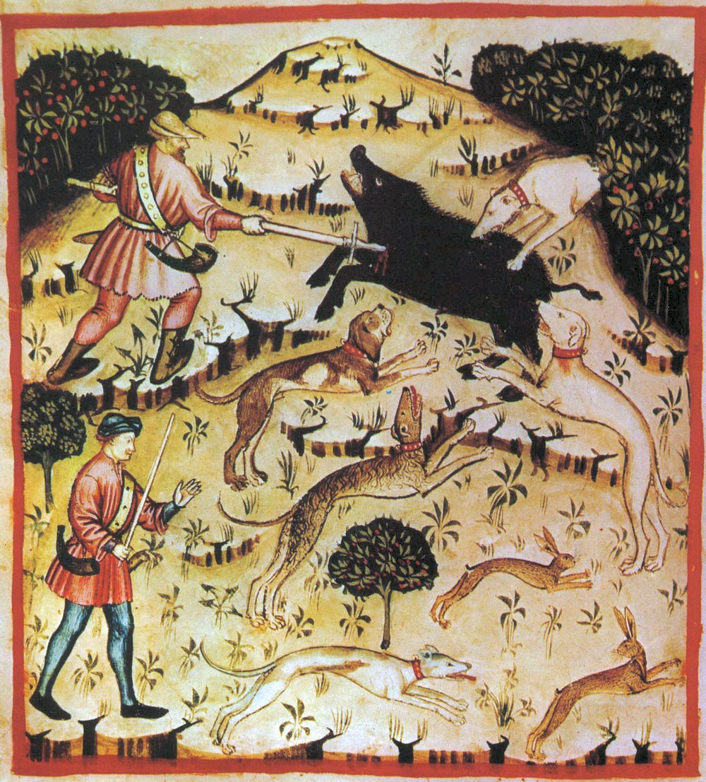 Traités de santé du 14ème siècle